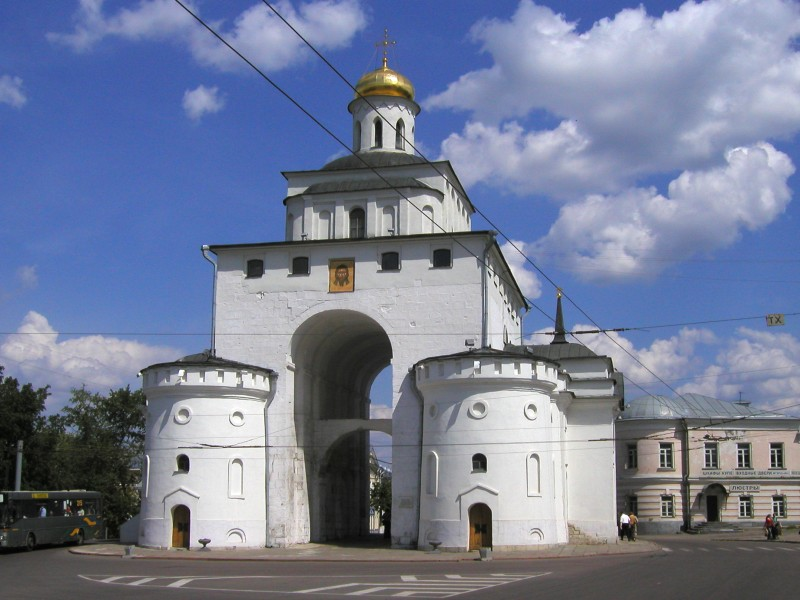 Золотые ворота города ВладимирЗолотые ворота, г. Владимир